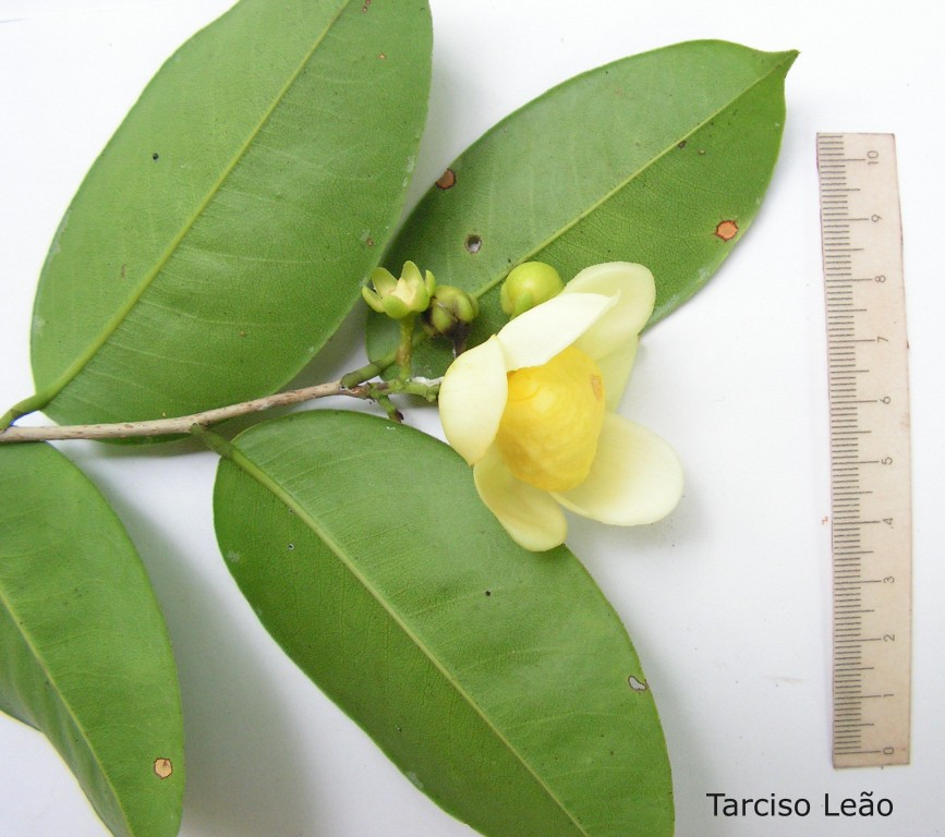 Local: Cond. Flor da Mata, Camaragibe, região de Aldeia, Pernambuco, Brasil